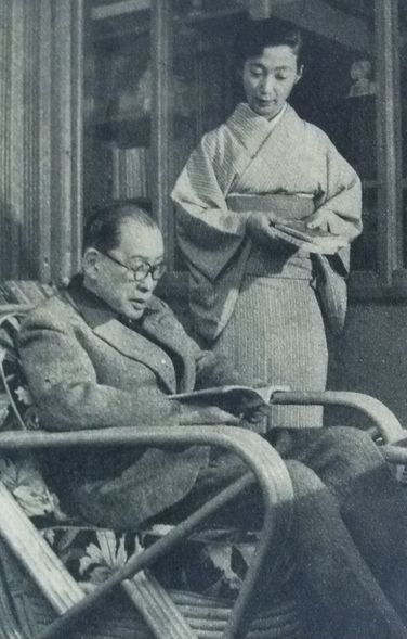 喜多村緑郎・九寿子夫妻